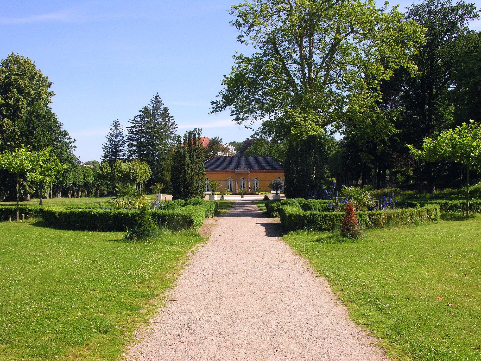 Schlosspark mit Orangerie - Ensemble Schloss Glücksburg Schleswig-Holstein Foto 2012 Wolfgang Pehlemann Steinberg DSCN0395